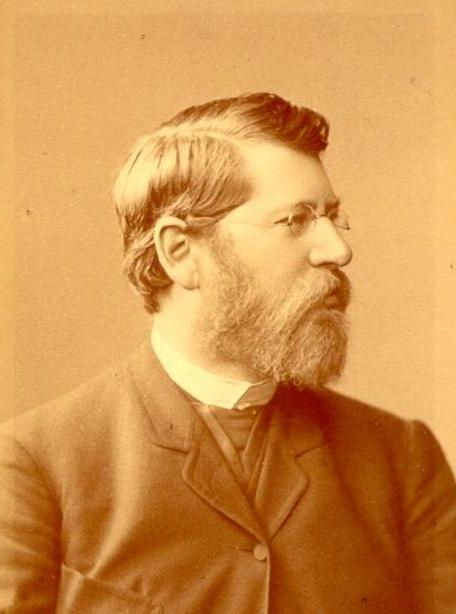 German philologist Julius Zupitza